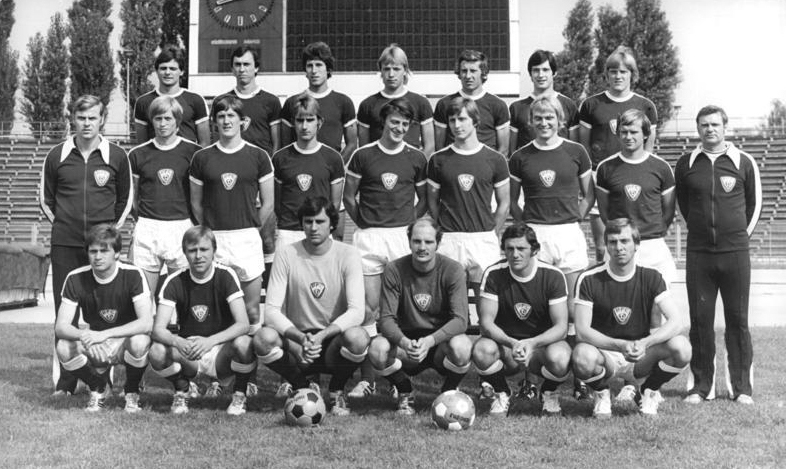 ADN-ZB-Mittelstädt-17.8.78-ma-Berlin: Das Fußball-Oberligakollektiv des BFC Dynamo. Vorn von links: Michael Noack, Wolf-Rüdiger Netz, Bodo Rudwaleit, Reinhard Schwerdtner, Reinhard Lauck und Frank Terletzki. Mittlere Reihe von links: der verantwortlicher Oberligatrainer Jürgen Bogs, Hans-Jürgen Riediger, Norbert Trieloff, Roland Jüngling, Artur Ullrich, Detlef Helms, Peter Rohde, Dietmar Labes und Trainerassistent Martin Skaba. Hintere Reihe von links: Lutz Eigendorf, Bernhard Jonelat, Bernd Brillat, Olaf Seier, Hartmut Pelka, Rainer Troppa und Ralf Sträßer.